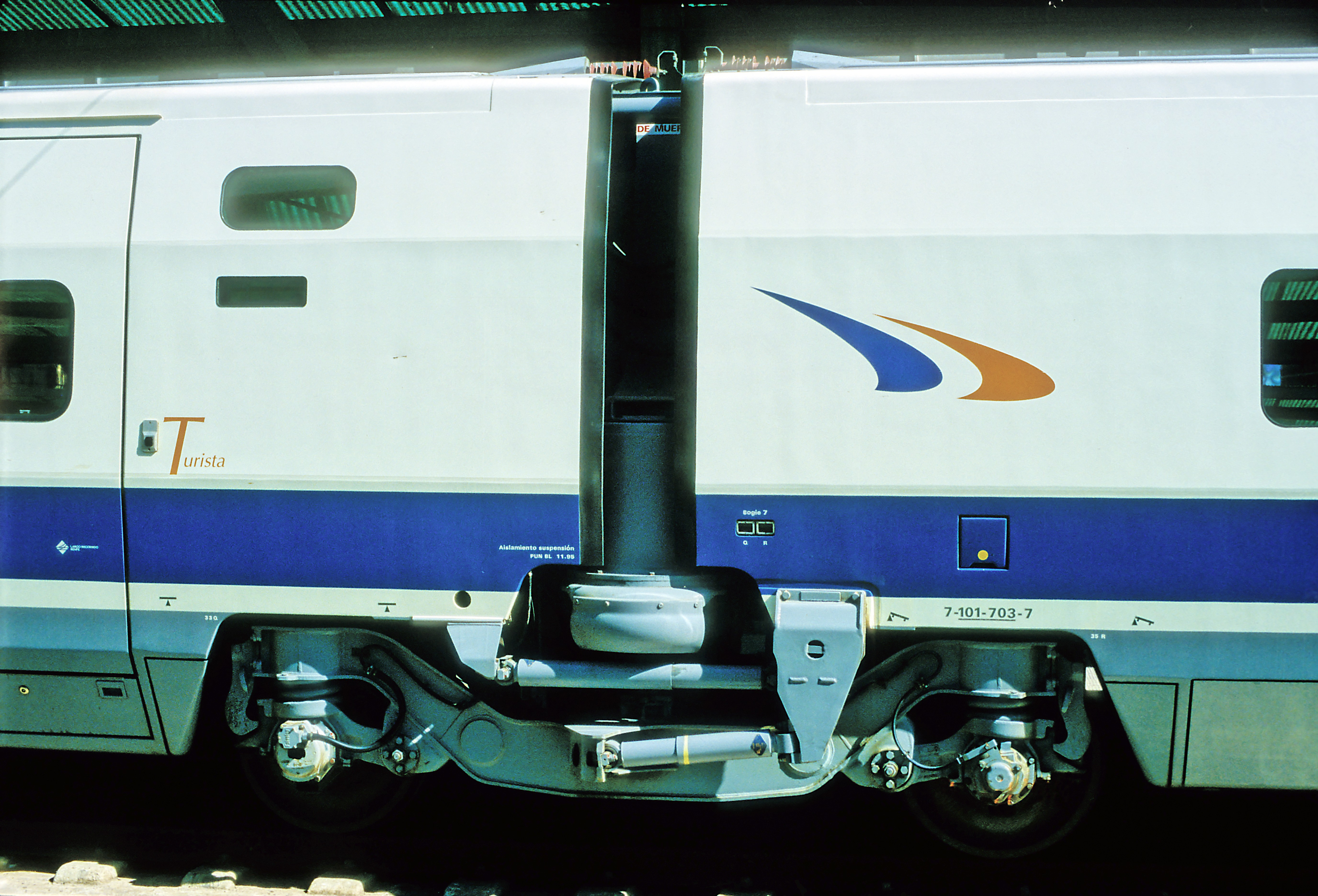 AVE- (TGV-) Einheit 9 101 203 auf Breitspur (»Euromed«)